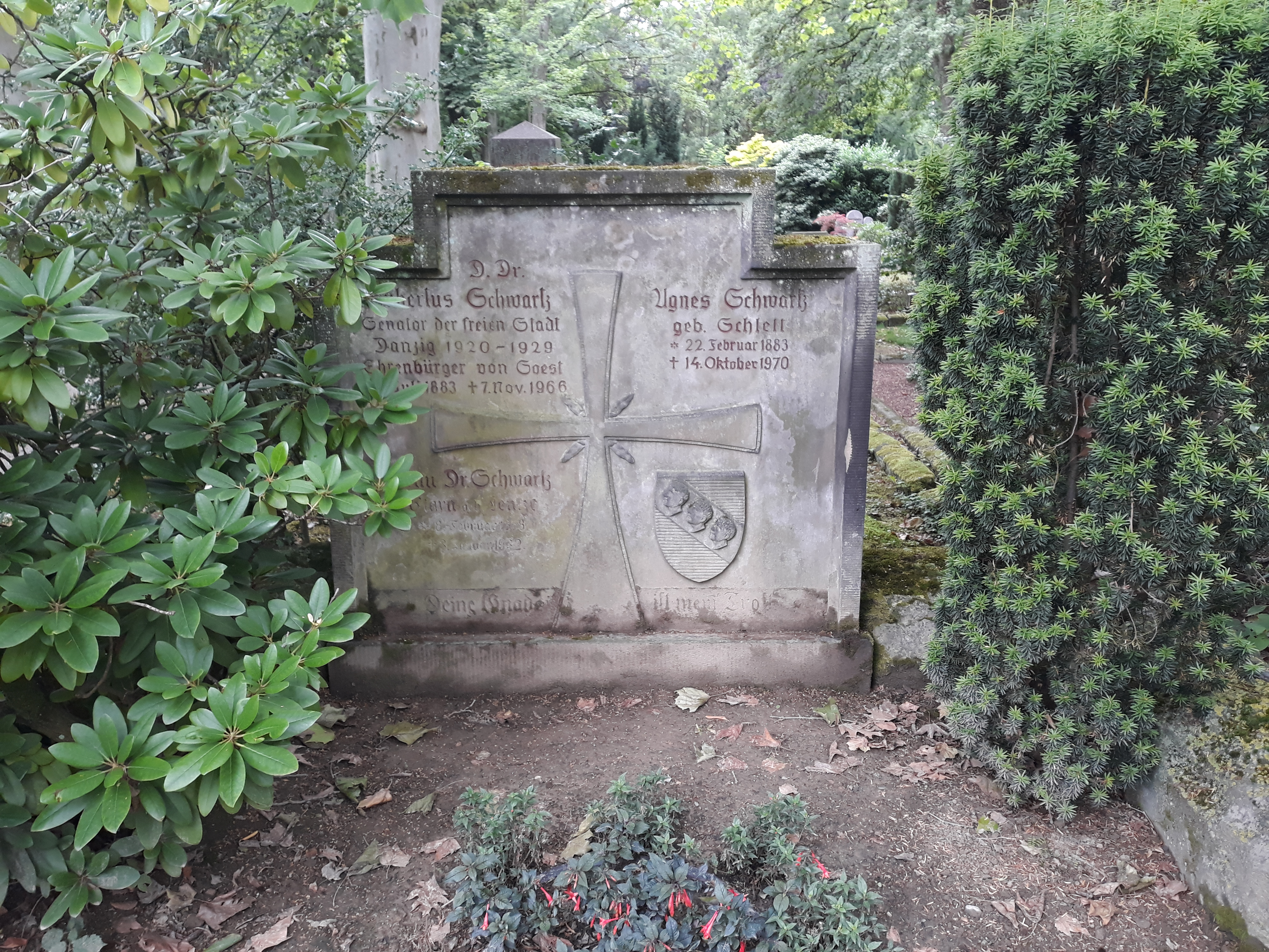 Das Grab des deutschen Juristen, Verwaltungsebamten und Politikers Hubertus Schwartz im Familiengrab auf dem Osthofenfriedhof Soest.